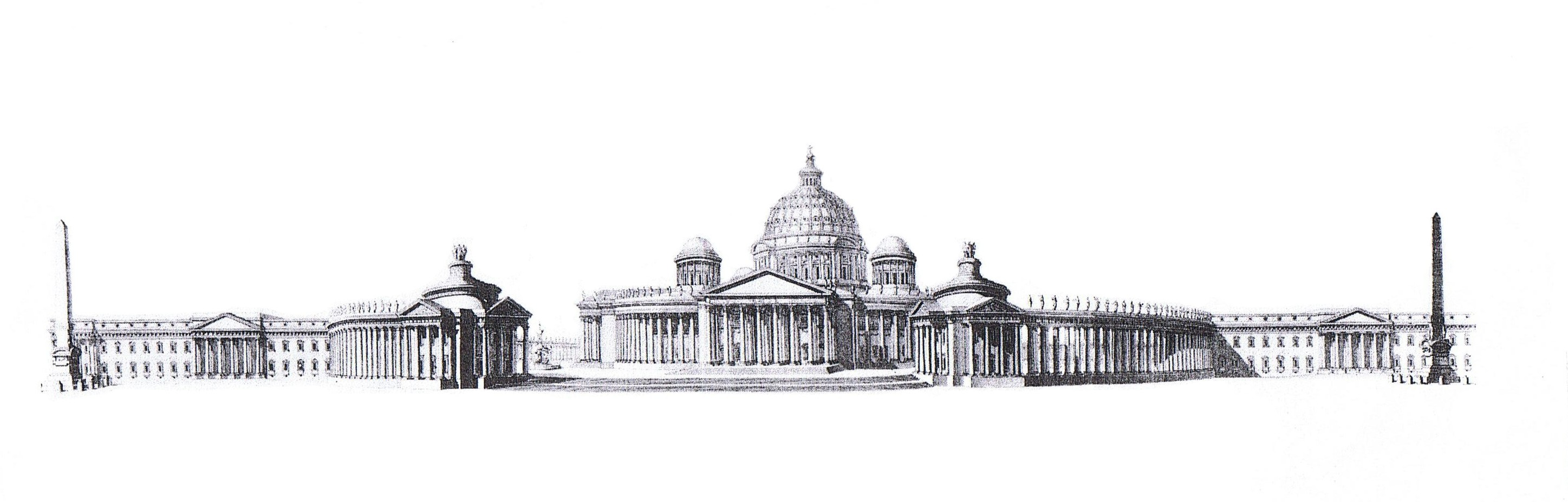 Vue du projet de cathédrale avec deux palais (concours clémentin de San Luca)